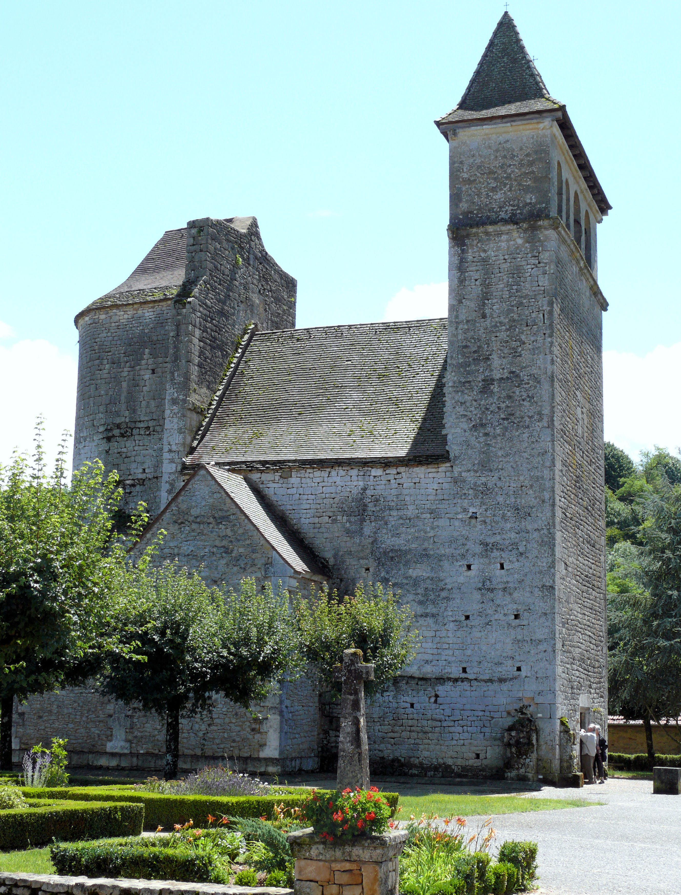 Prats-du-Périgord - Eglise Saint-Maurice